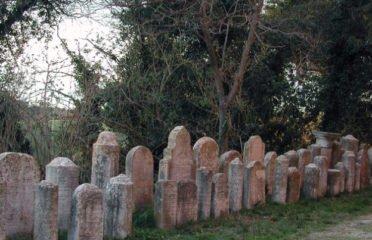 Lapidi situate nel parco Anne Frank a testimonianza della presenza dell'ex cimitero.